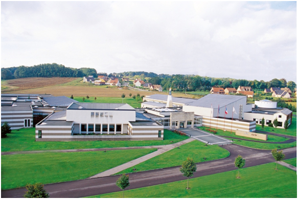 Campus de l'ESCIP